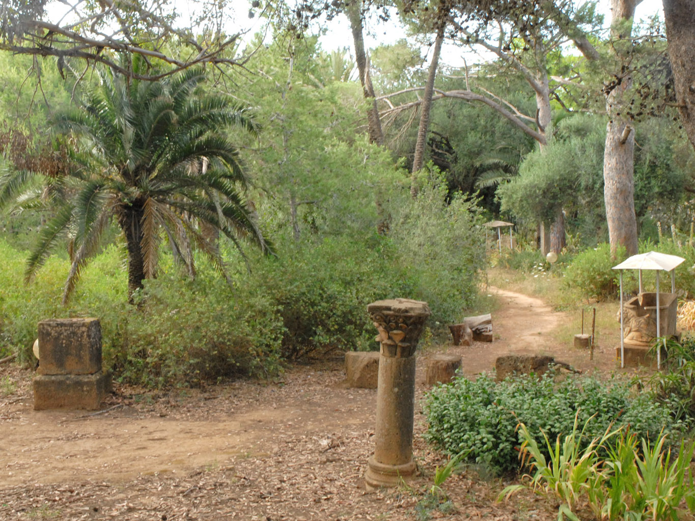 Le ruines romaines de Tipaza